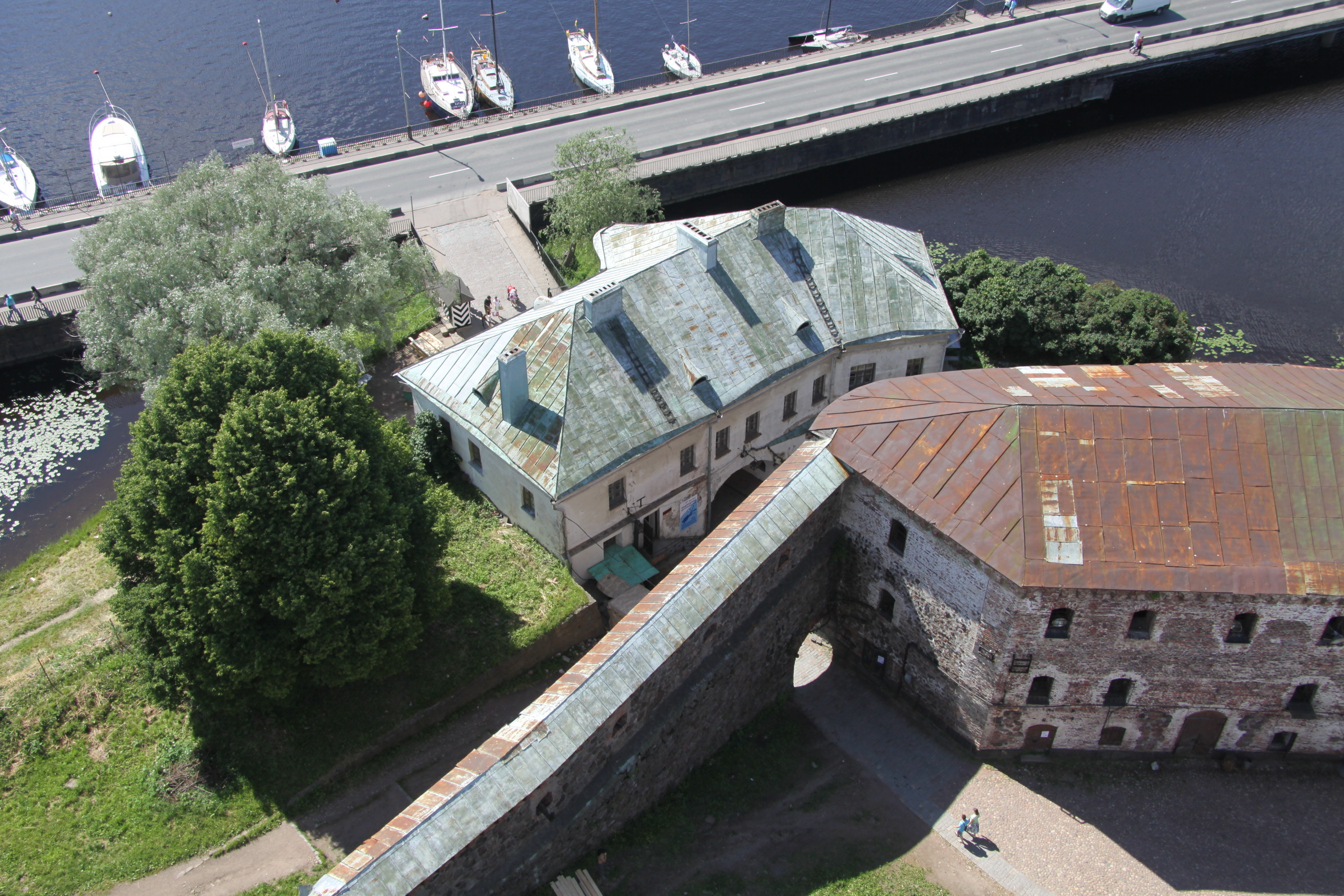 Замок-крепость (комплекс крепостных построек и сооружений на острове) (Лен.область, Выборг, Выборгская слобода, о. Замковый)